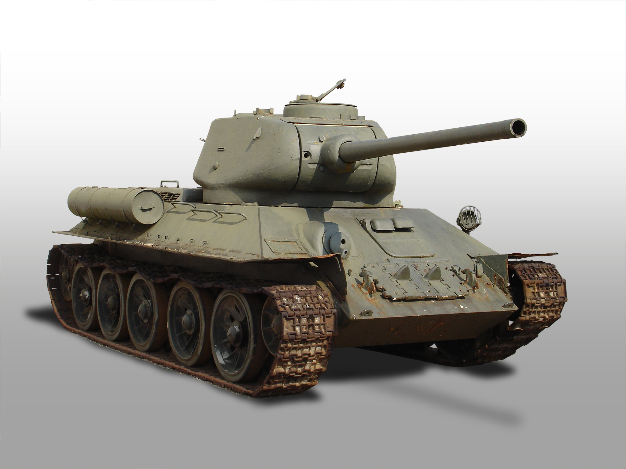 Sowjetischer T-34 Panzer (Baujahr 1944)